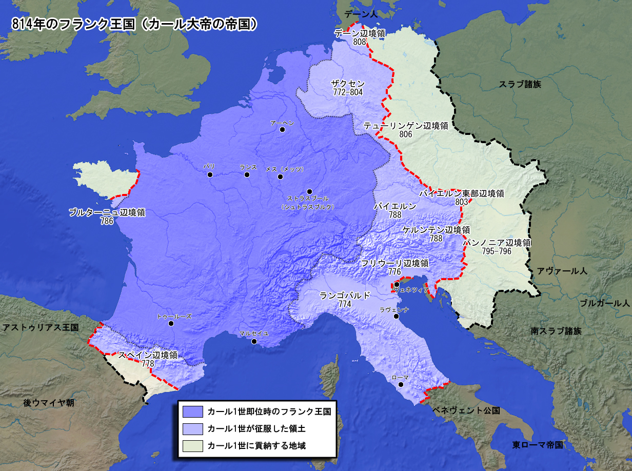 814年のフランク王国。